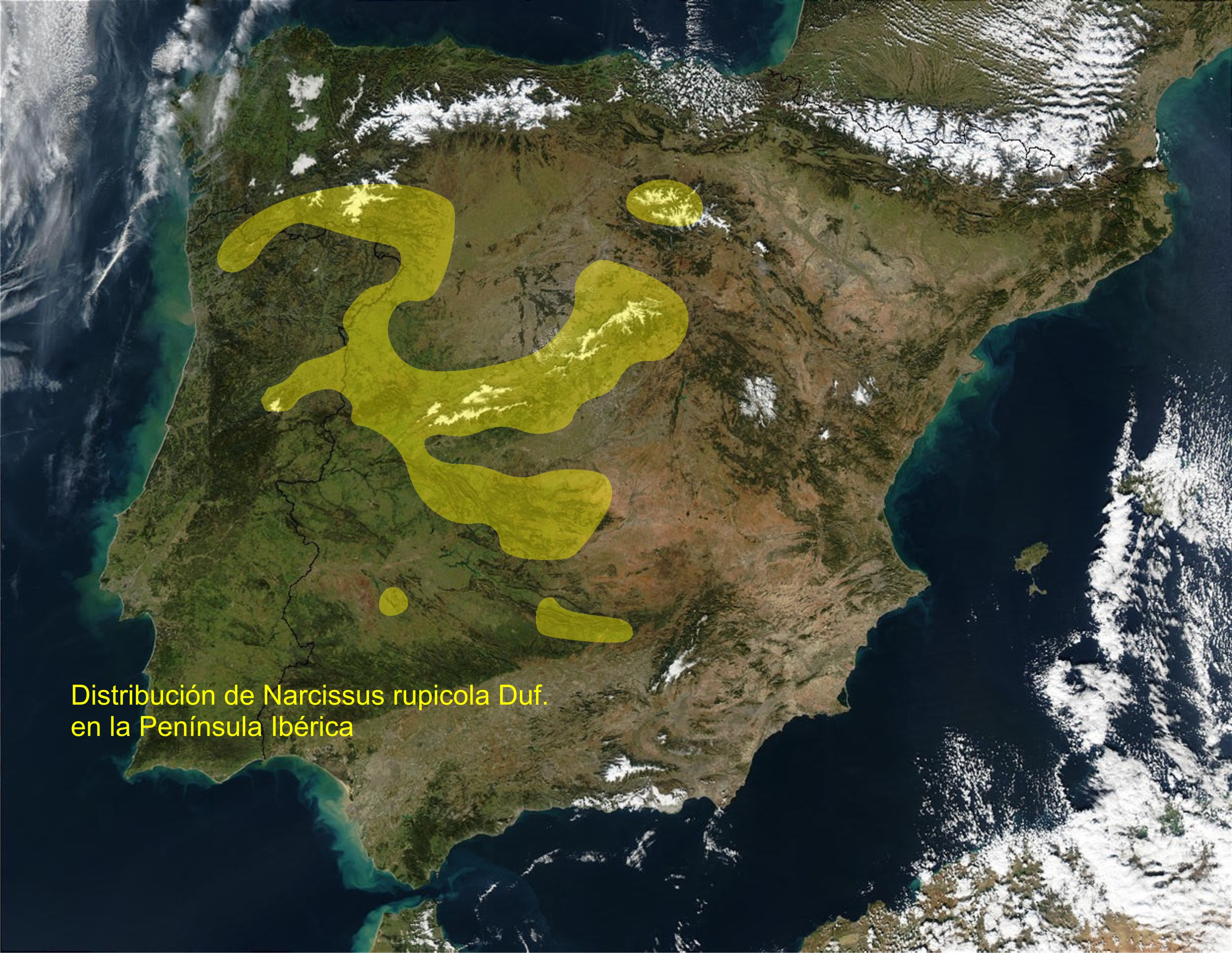 Área de distribución de Narcissus rupicola Duf. en la Península Ibérica.